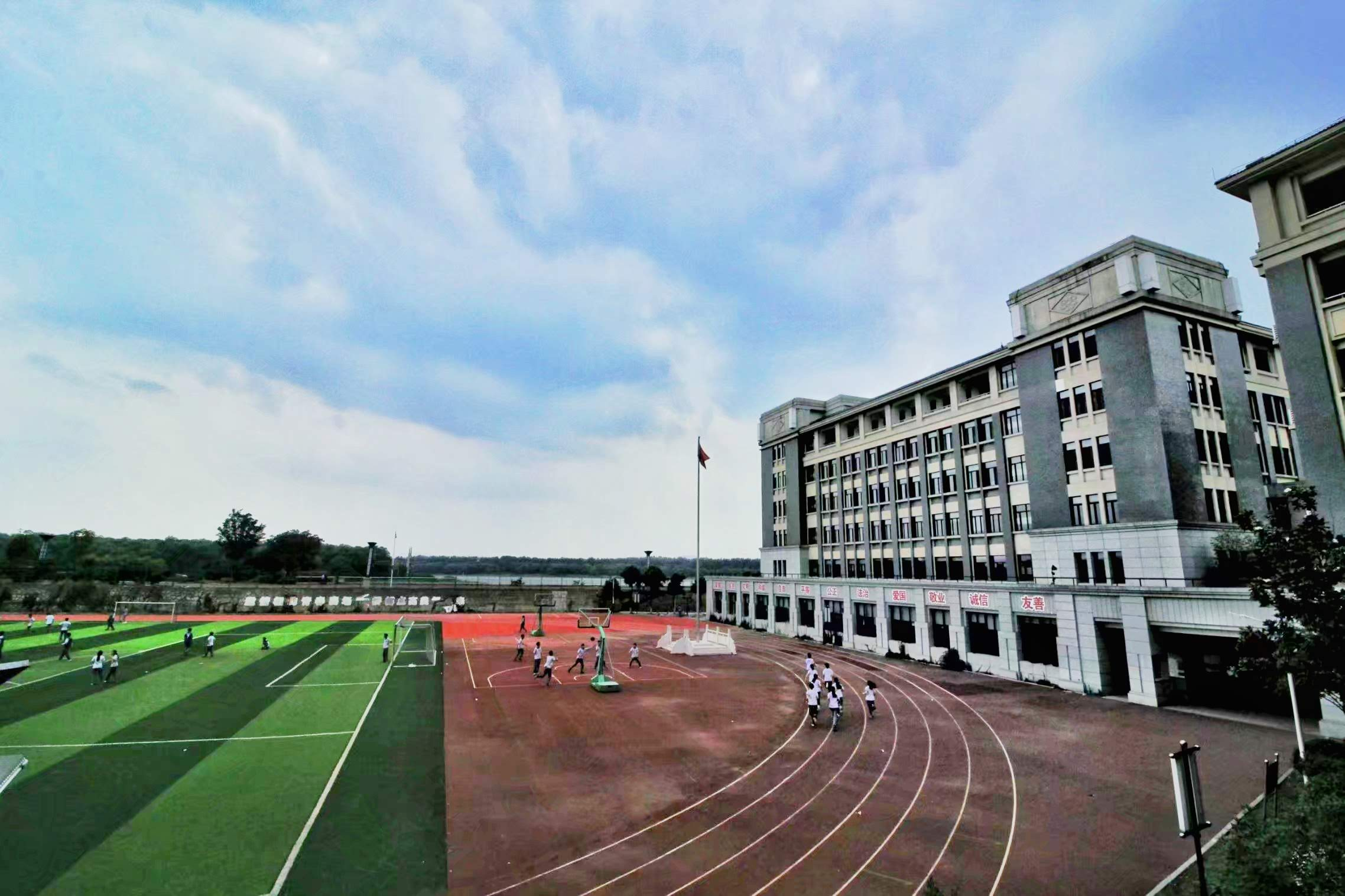 中文（中国大陆）: 南京师范大学附属中学树人学校操场